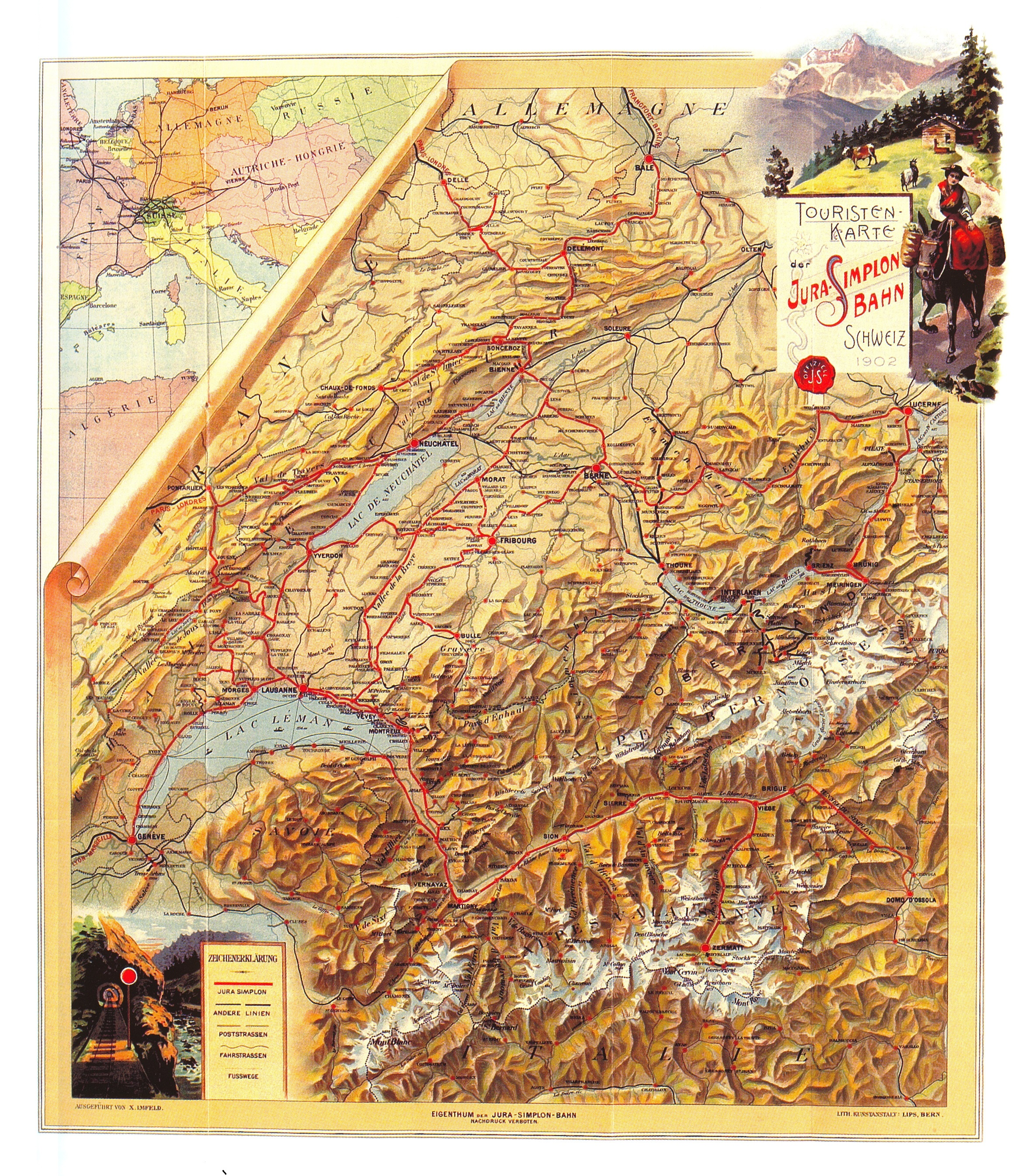 Die Jura–Simplon-Bahn (JS) war vor der Verstaatlichung eine der grossen Privatbahn-Gesellschaften der Schweiz. Sie entstand 1890/91 durch die Fusion der wichtigsten Westschweizer Bahnen Suisse-Occidentale–Simplon, Pont–Vallorbe und Jura–Bern–Luzern.